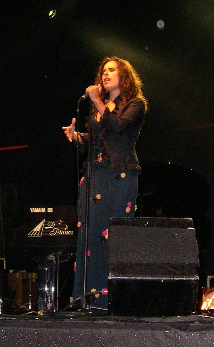 Cristina Branco en Xixón, Asturies